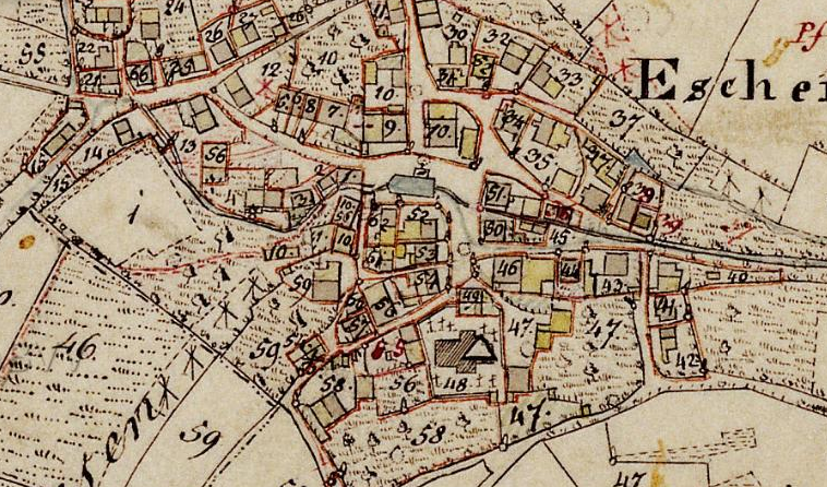 Eschenfelden auf dem Urkastaster von Bayern